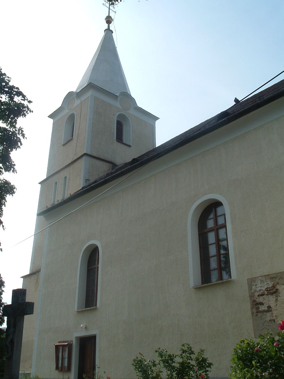 Roman Catholic Church Kőszegszerdahely, Hungary. Mindenszentek római katolikus templom